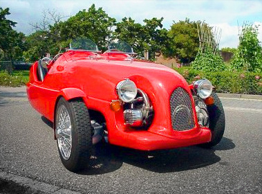 Een Le Patron driewieler (één enkel wiel op de achteras) Foto gemaakt en geplaatst door Wim van den Bergh Foto staat op en kan vrij gebruikt worden